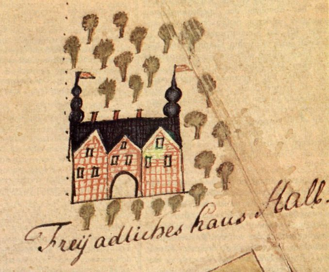 Abbildung des Hauses Hall in Hückelhoven-Ratheim auf einer Karte von 1702